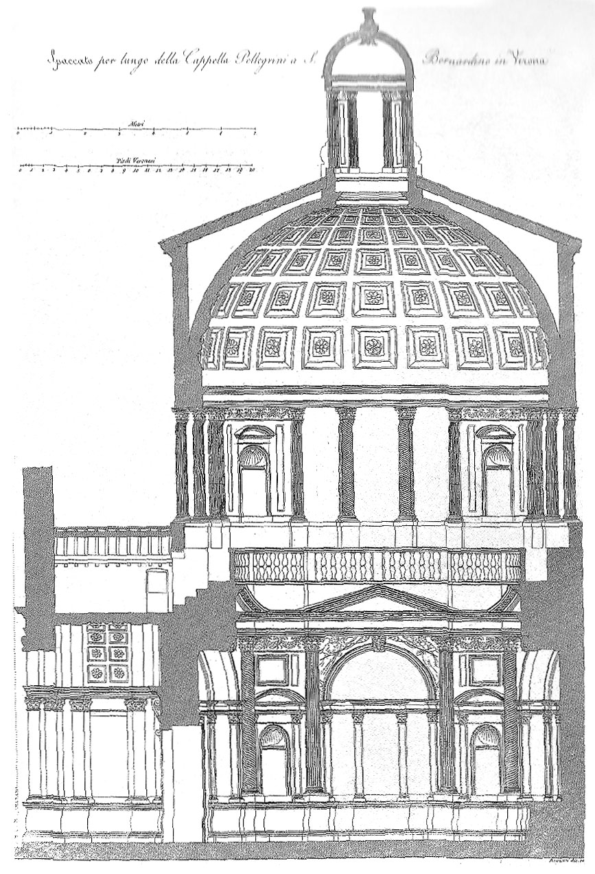 Cappella Pellegrini a Verona, opera di Michele Sanmicheli, disegnata da Francesco Ronzani